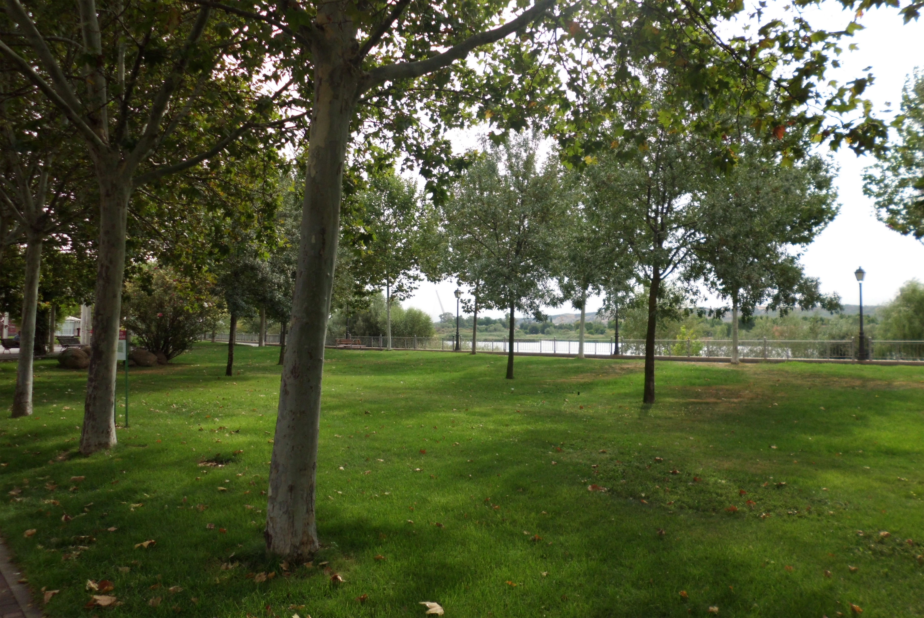 Parque frente a la zona de la Universidad de Castilla La Mancha en Talavera e la Reina